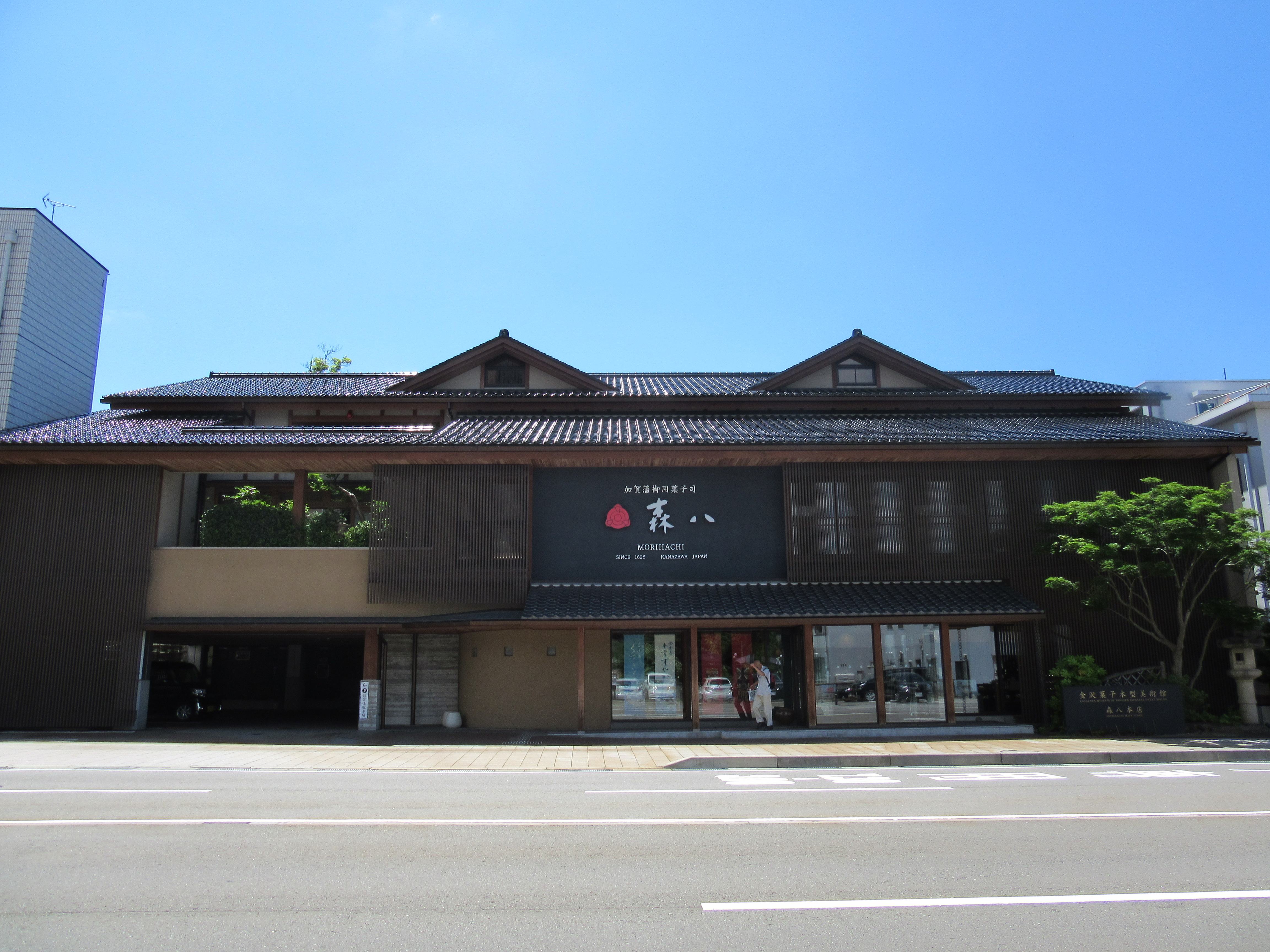 森八本店（金沢市）